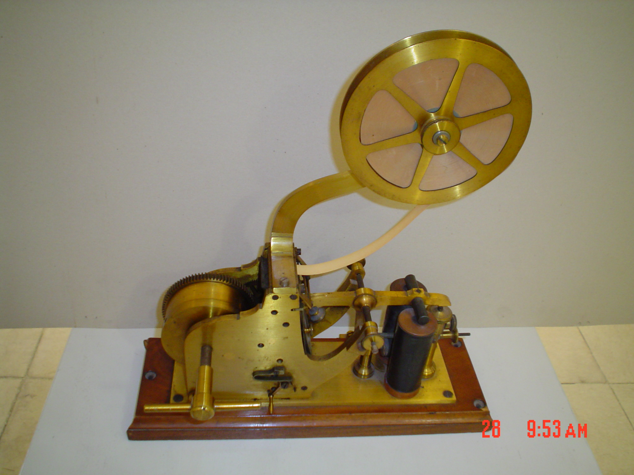 Morsa-tipa ricevilo kun paperrubando (supre) kaj relajso (dekstre, nigra).